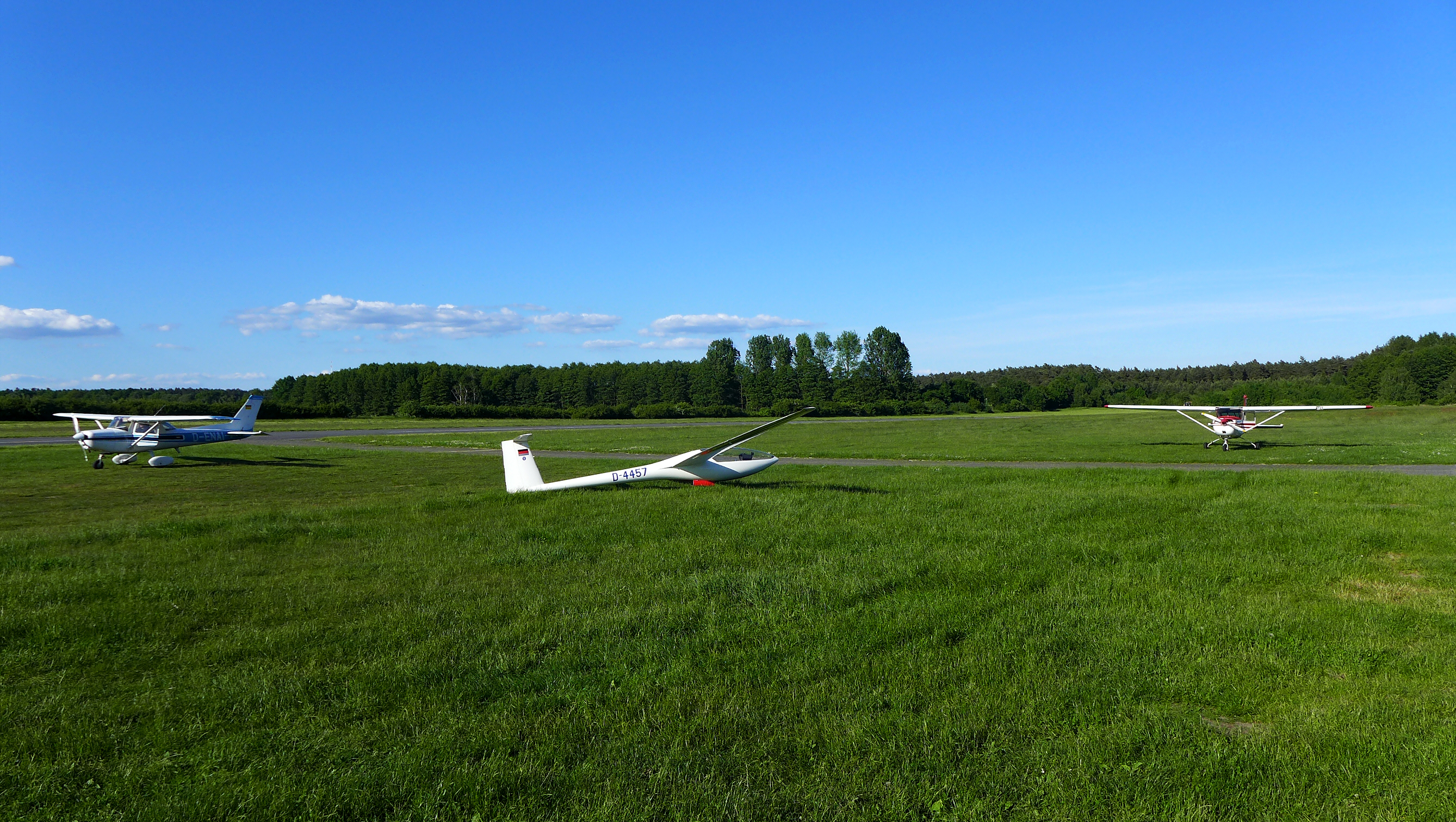 Flugplatz Barnsen, zugehörig zur Gemeinde Gerdau nahe Uelzen; auch bekannt unter der Bezeichnung Flugplatz Uelzen mit der Kennung EDVU. Standort des Luftsportverein Cumulus.